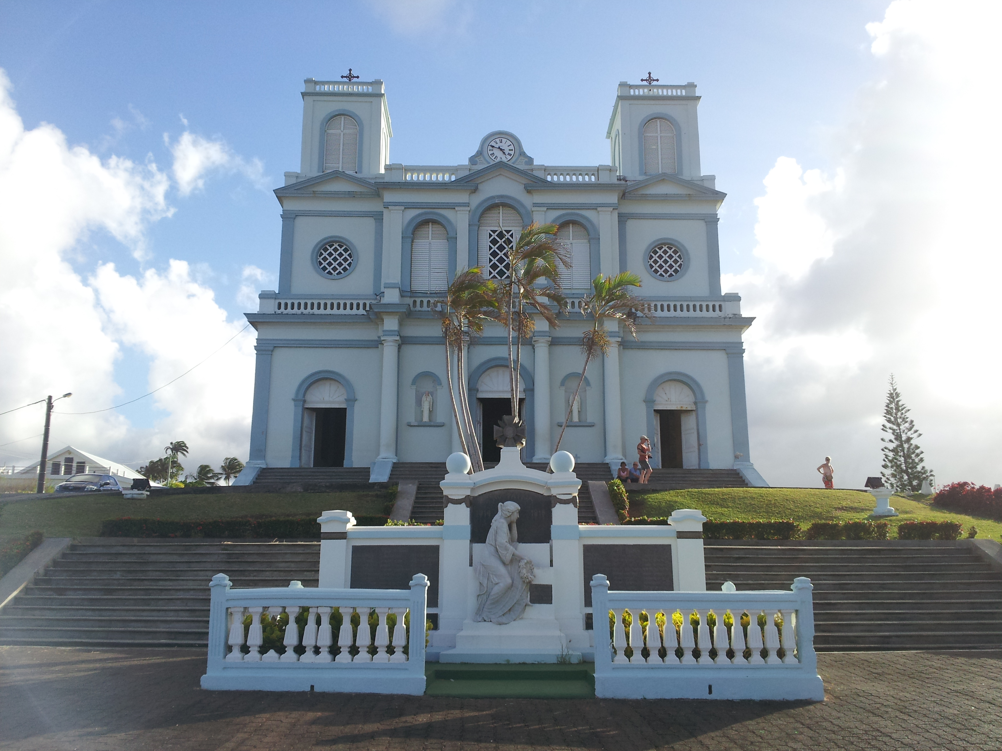 Façade de l'église Notre-Dame-de-l'Assomption de Sainte-Marie en Martinique